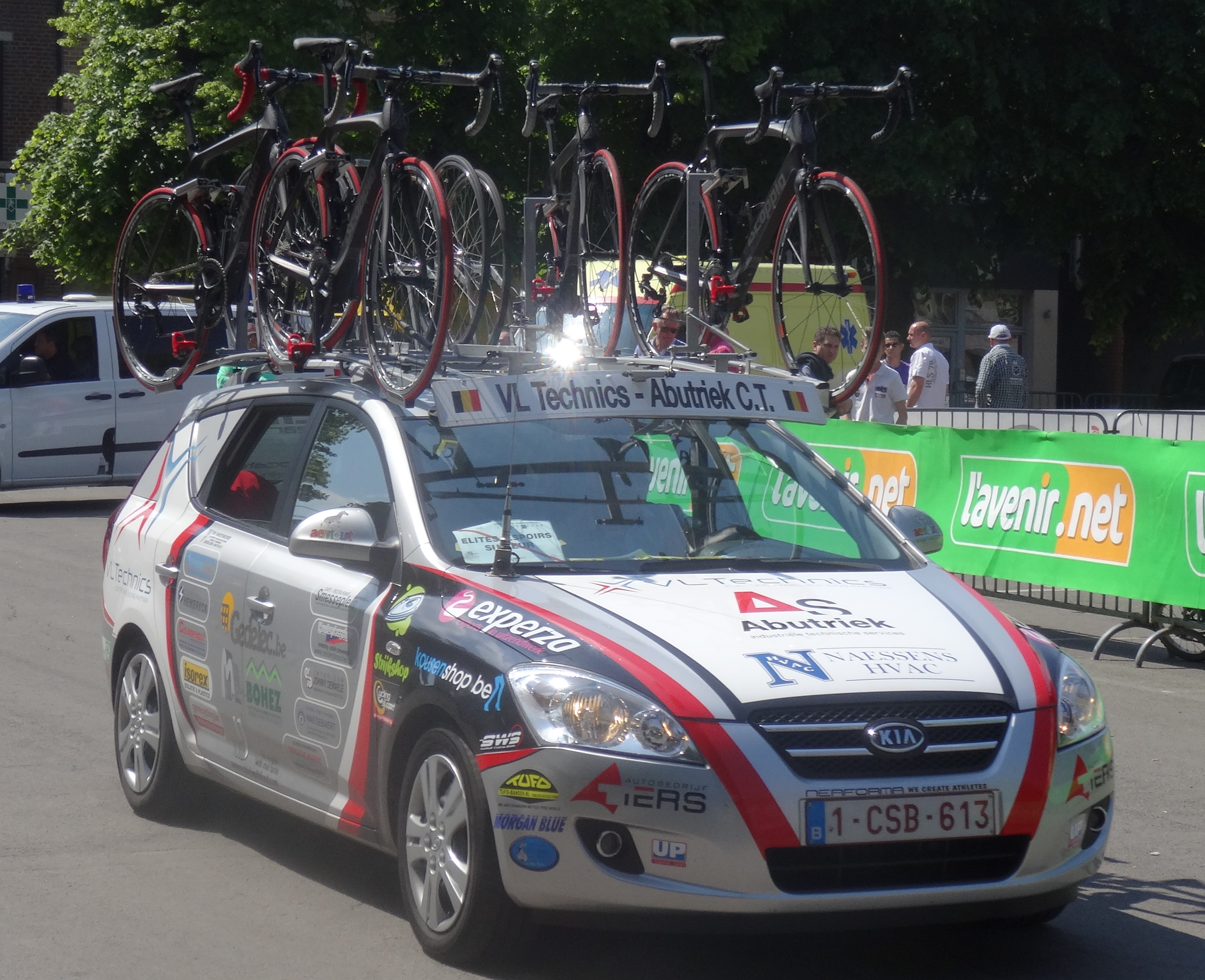 Reportage réalisé le samedi 17 mai à l'occasion du départ du Grand Prix Criquielion 2014 à Boussu, Belgique.